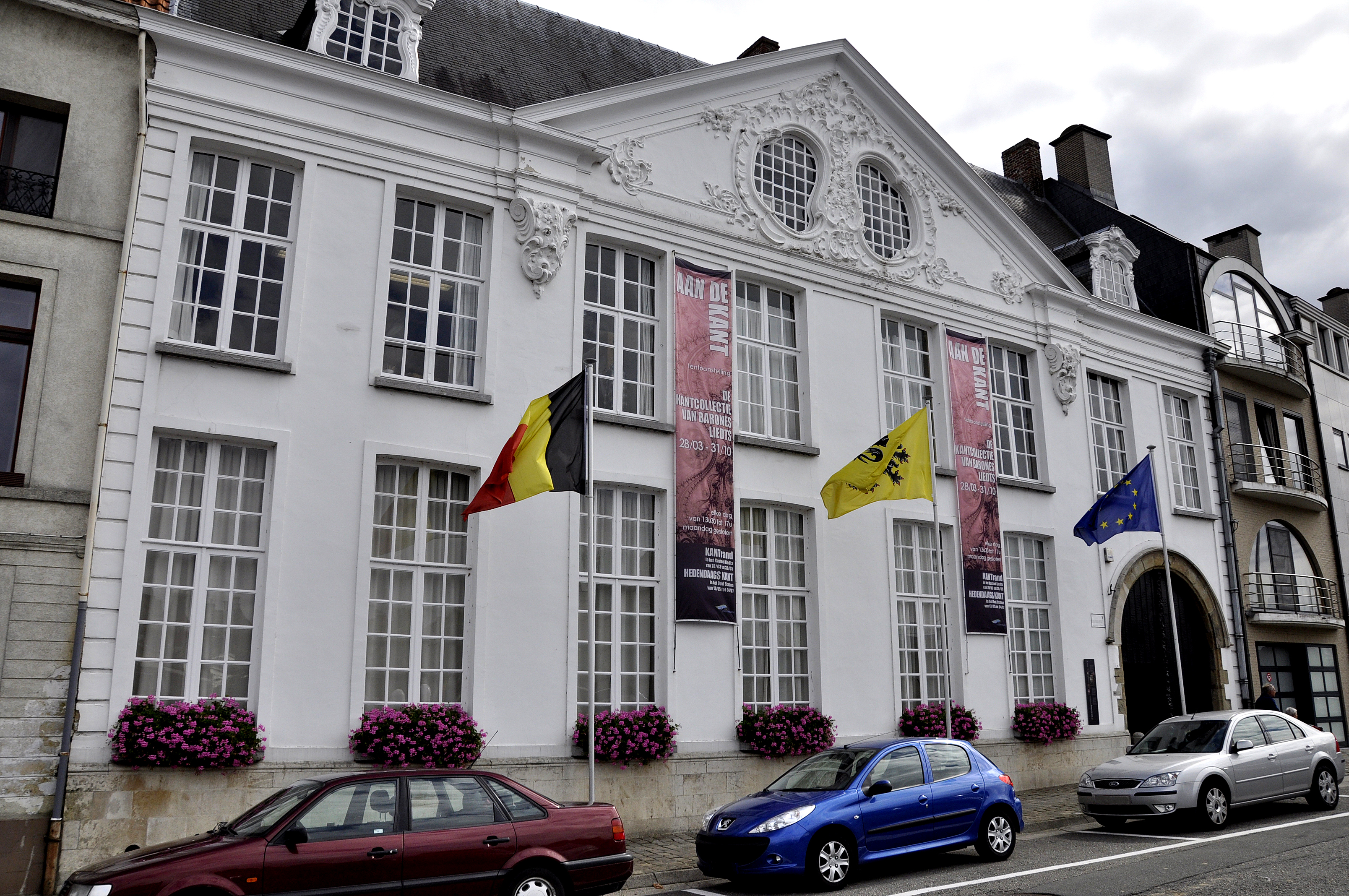 Huis de Lalaing te Oudenaarde, België